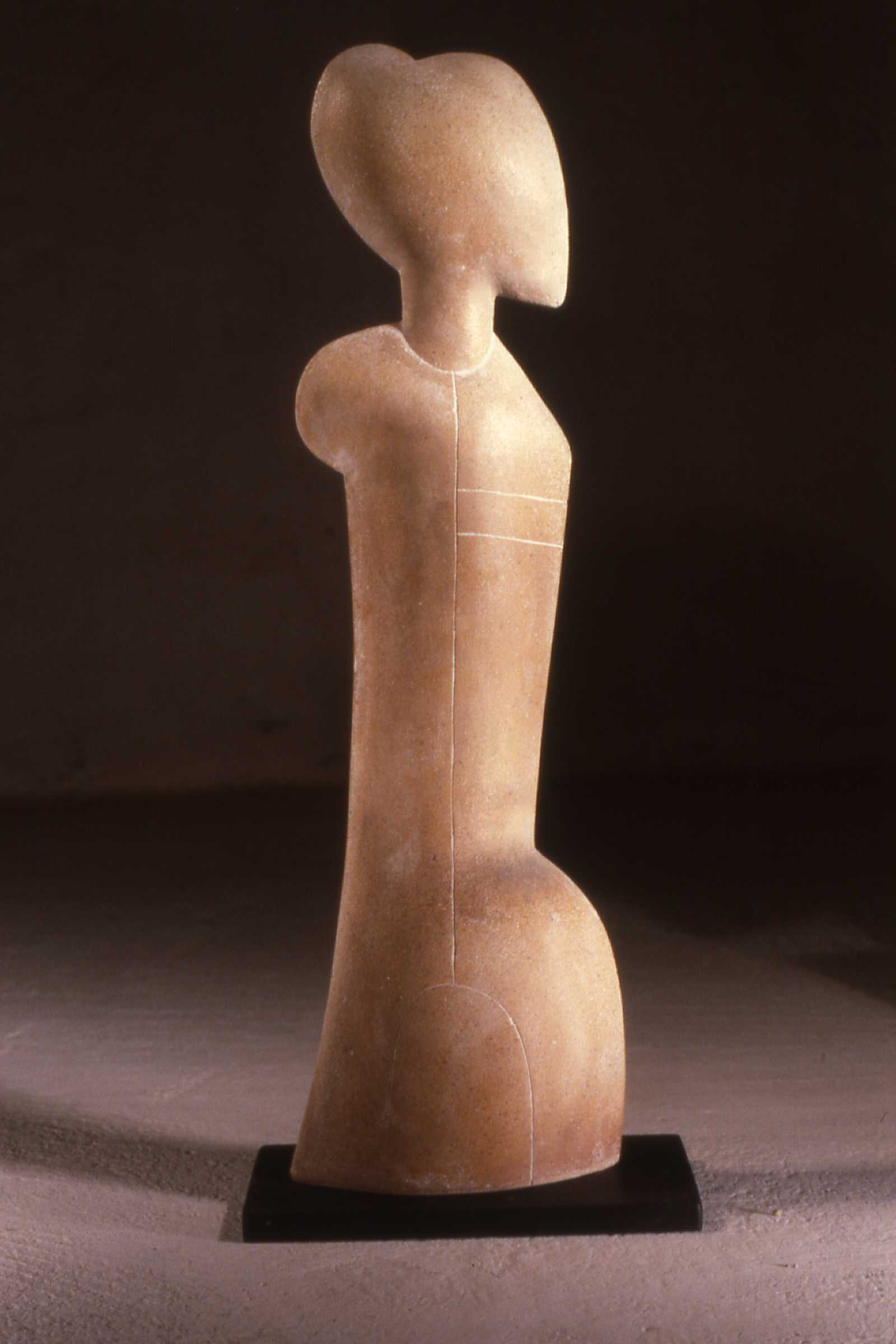 Sculpture céramique (grès) d'Antoine de Vinck, faisant partie de la série des Atlantes. 1987.